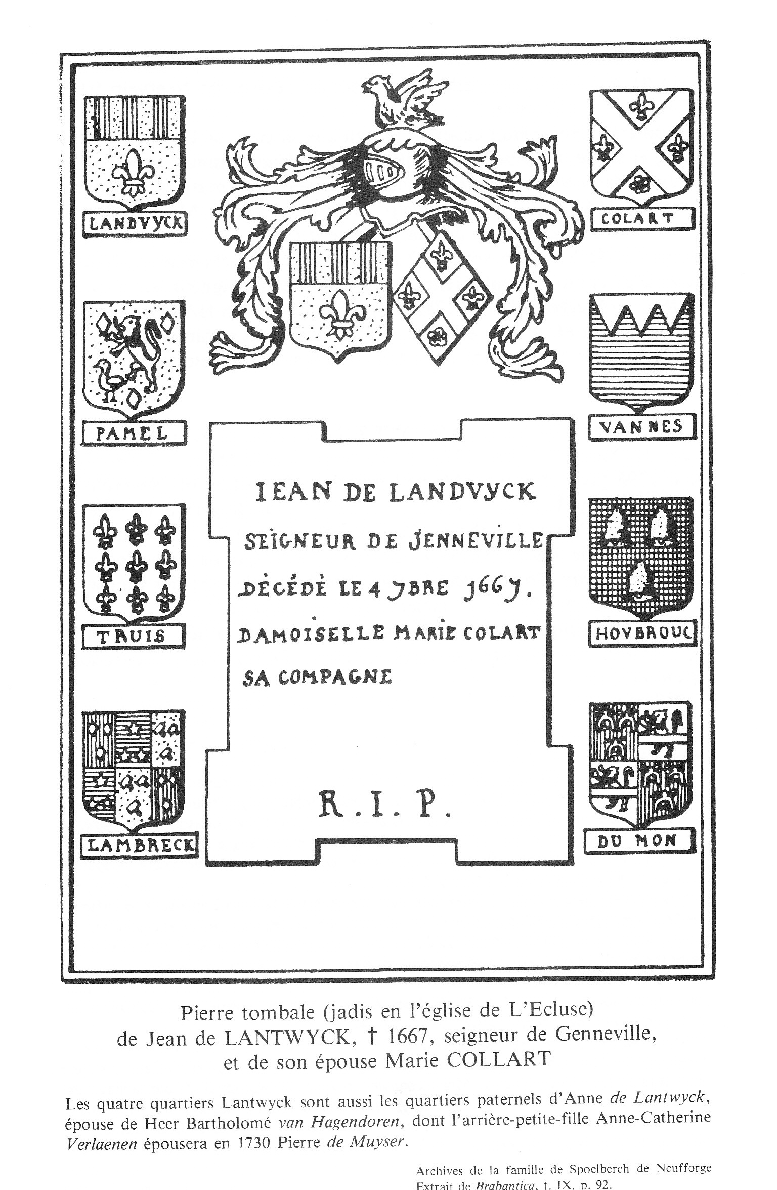 Pierre tombale de Lantwyck Sur ce dessin il y a quelques erreurs d'émaux : Lantwyck doit être sur champ d'argent, au lieu d'or, de même que Pamel et Vannes; du Mont, les émaux du 1 probablement inversés et de gueules sur argent comme habituellement.